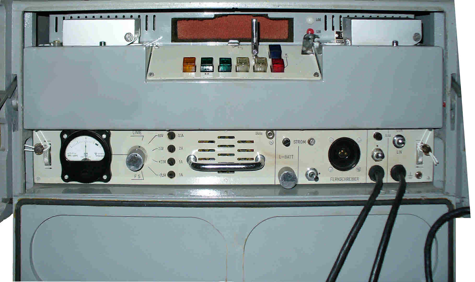 Polnisches Chiffriergerät TgS-1 DUDEK. In der DDR lief es unter der Bezeichnung T-353.